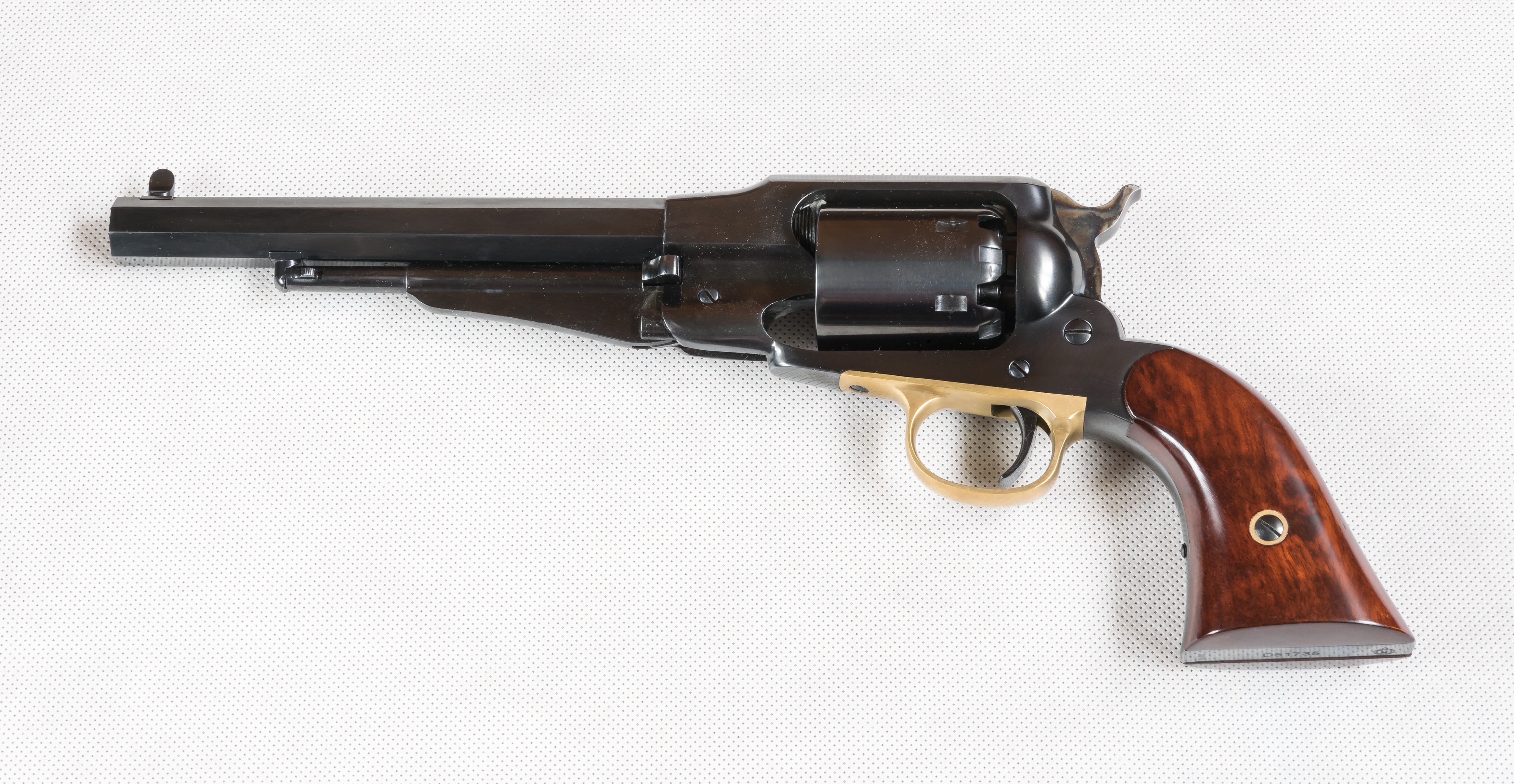 Rewolwer czarnoprochowy Uberti 1858 New Improved Navy .36